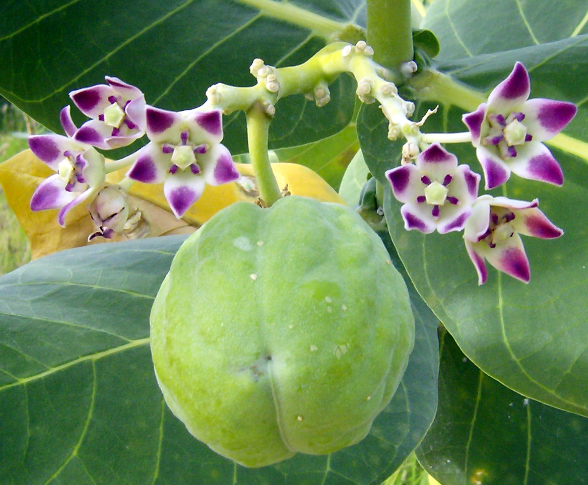 Calotropis procera. Calotropis procera es un pequeño árbol perennifolio, hermafrodita de hasta 4-6 m de altura, con porte erguido. Copa más o menos redondeada. Tronco bien definido, recto a un poco tortuoso, con característica corteza suberosa agrietada que recuerda a la del alcornoque, pero de color blanco.